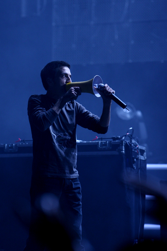 Manel Cruz, no concerto no Pavilhão Atlântico dos Da Weasel. 10 de Novembro 2007